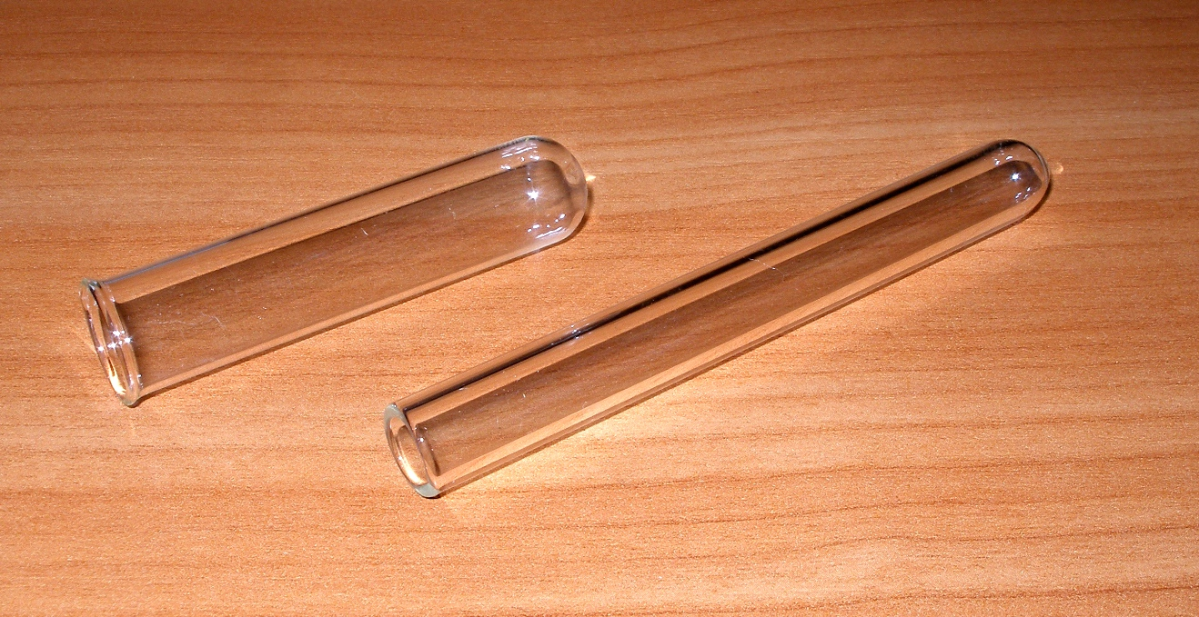 Divu veidu mēģenes.